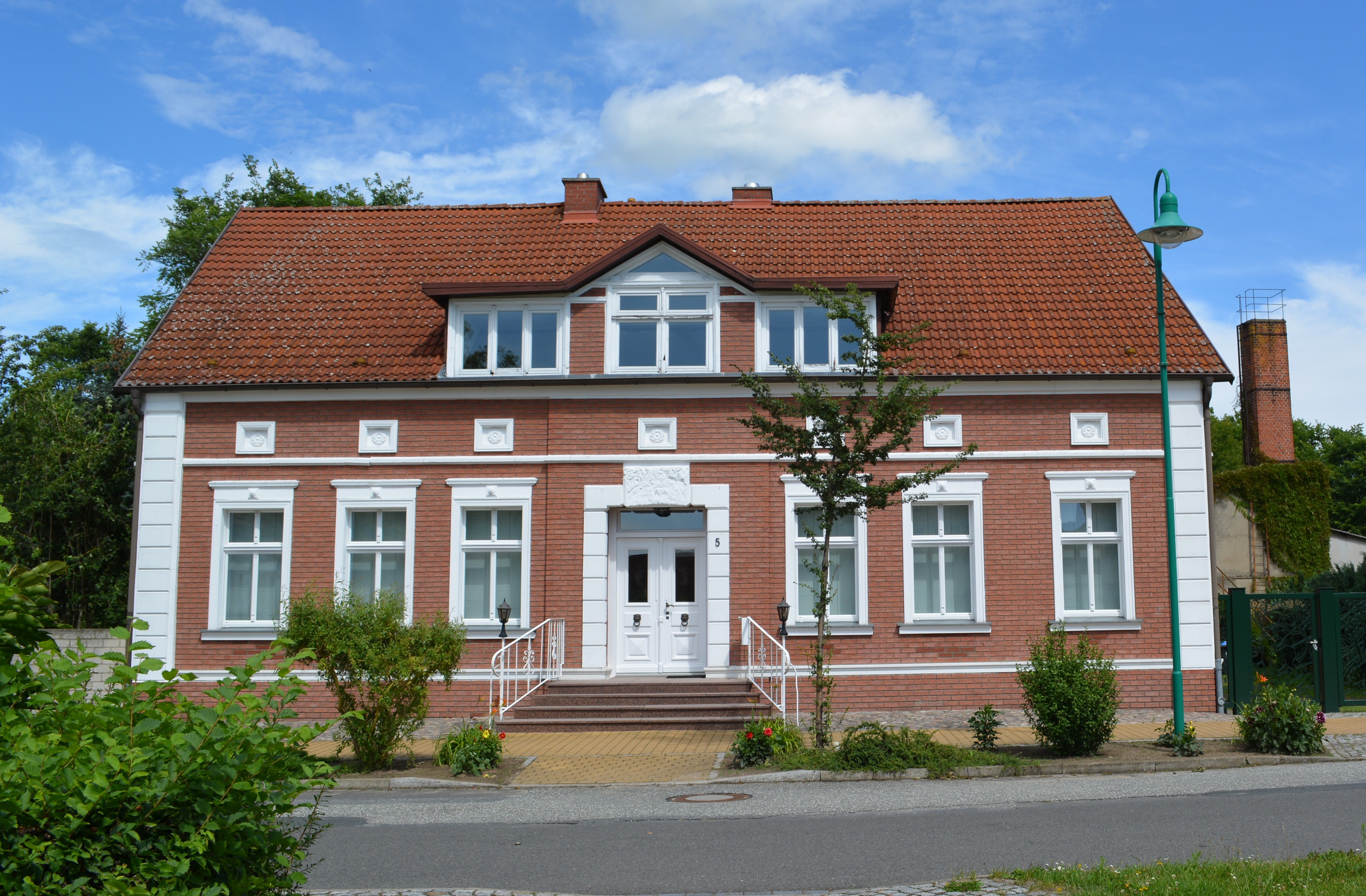 Wohnhaus in der Altstadt von Rhinow, Landkreis Havelland